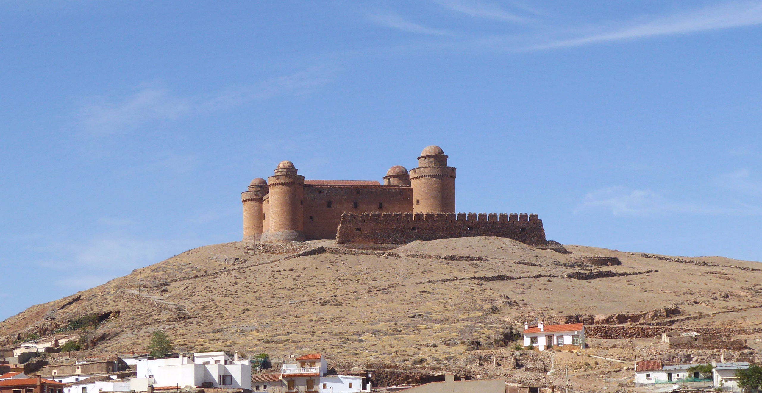 Castillo de La Calahorra aus dem 16. Jahrhundert. Geschütztes Monument in Privatbesitz, nördlich span Sierra Nevada Andalusien Spanien Foto Wolfgang Pehlemann P1110155